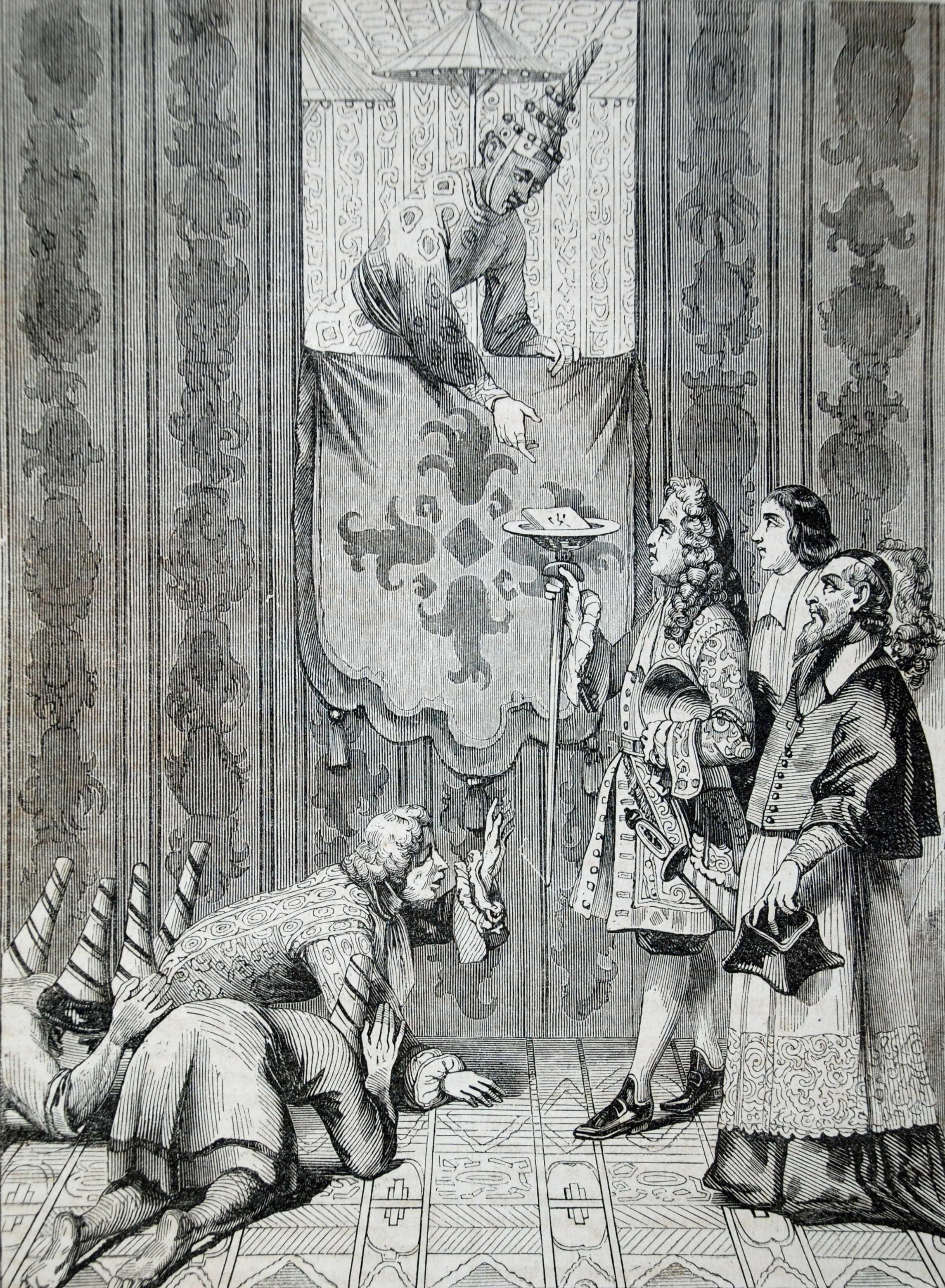 Gravure publiée dans Le Magasin pittoresque, 1840, p. 33, en accompagnement de l'article "Ambassade française à la cour du Roi de Siam (1685)". Elle représente la première audience solennelle accordée le 18 octobre 1685 par le roi Narai au Chevalier Alexandre de Chaumont, ambassadeur de Louis XIV. La légende de la gravure reprend un extrait de la relation de sa mission par Alexandre de Chaumont : « Je fis semblant de n'entendre point ce qu'on me disait, et me tins ferme. Alors le roi, se mettant à sourire, se leva, et se baissant pour prendre la lettre dans le vase, se pencha de manière qu'on lui vit tout le corps. »